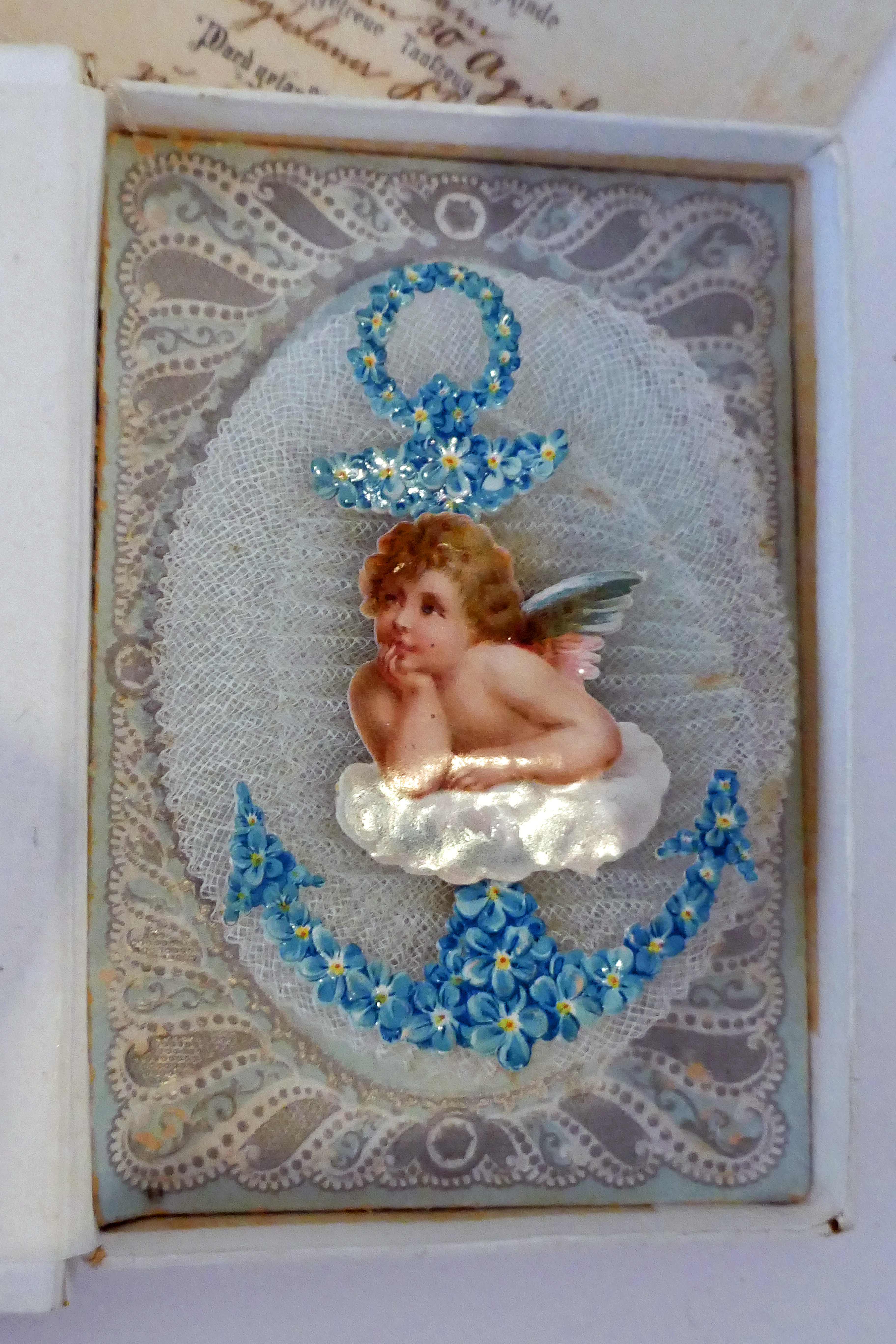 Boîte-souvenir de baptême de la fin du 19e siècle en Alsace : les lettres de baptême sont pliées dans des boîtes contenant une petite enveloppe pour la monnaie. Exposition Vies protestantes : le mot et l'image au Musée alsacien de Strasbourg (2017).